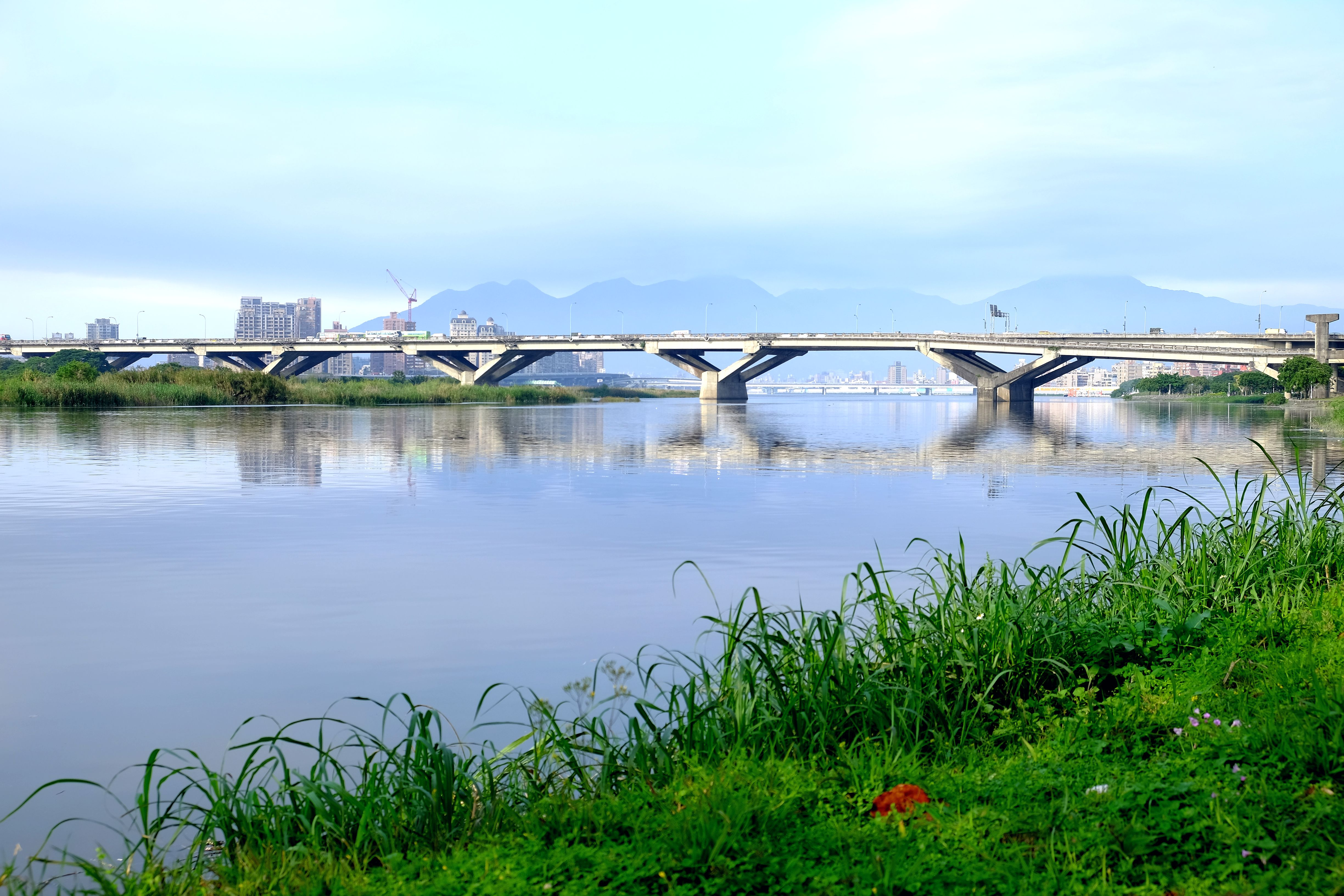 忠孝橋